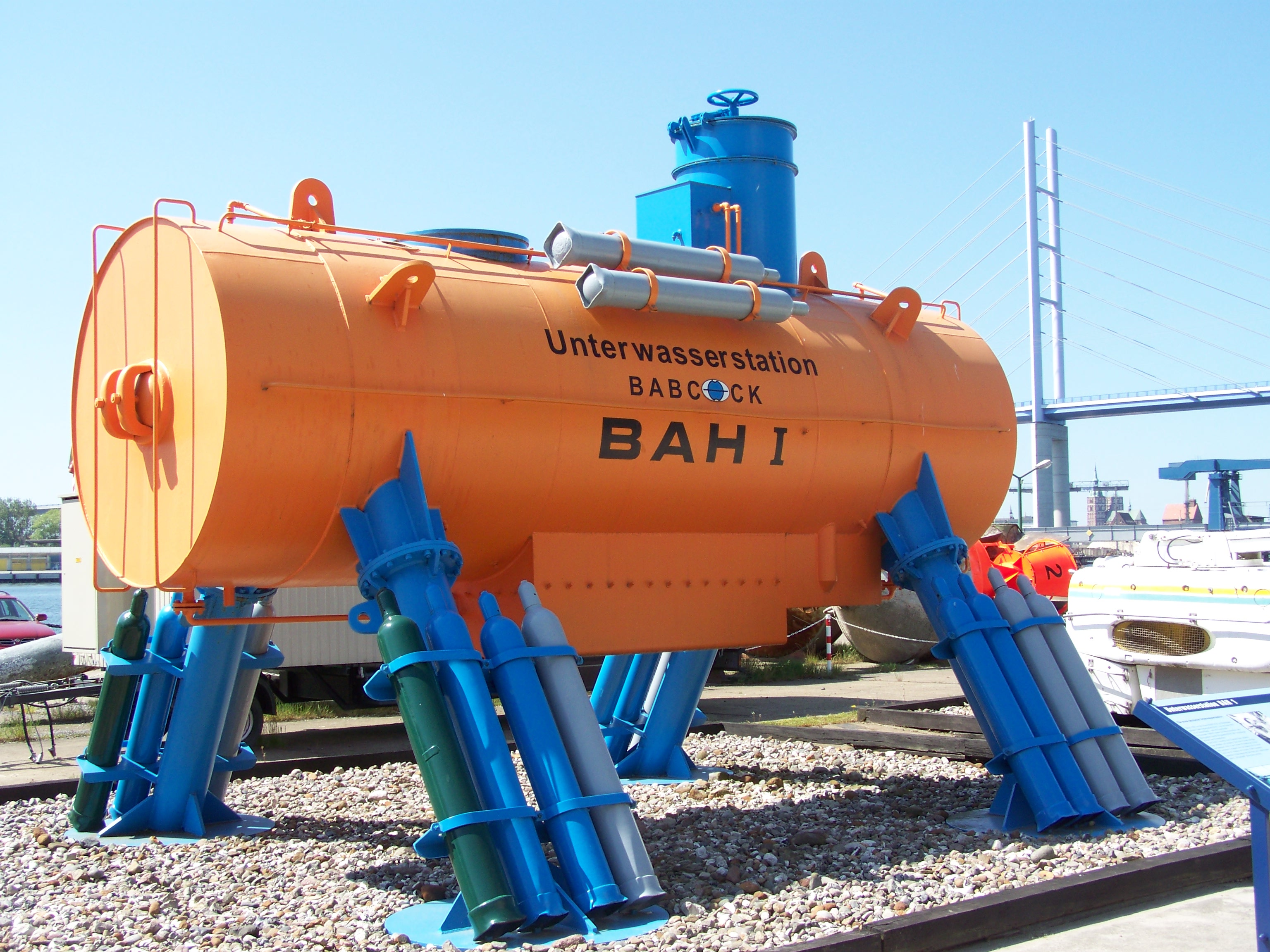 Unterwasserstation BAH-1 im Nautineum Stralsund (2008-05-11)